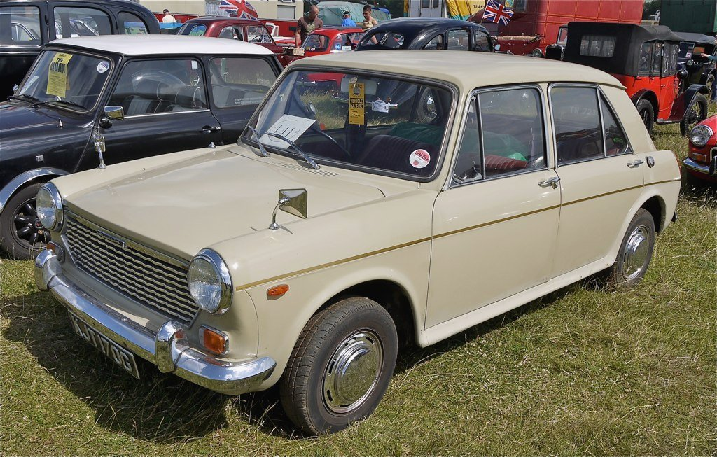 Panasonic G1 14-45 Lens